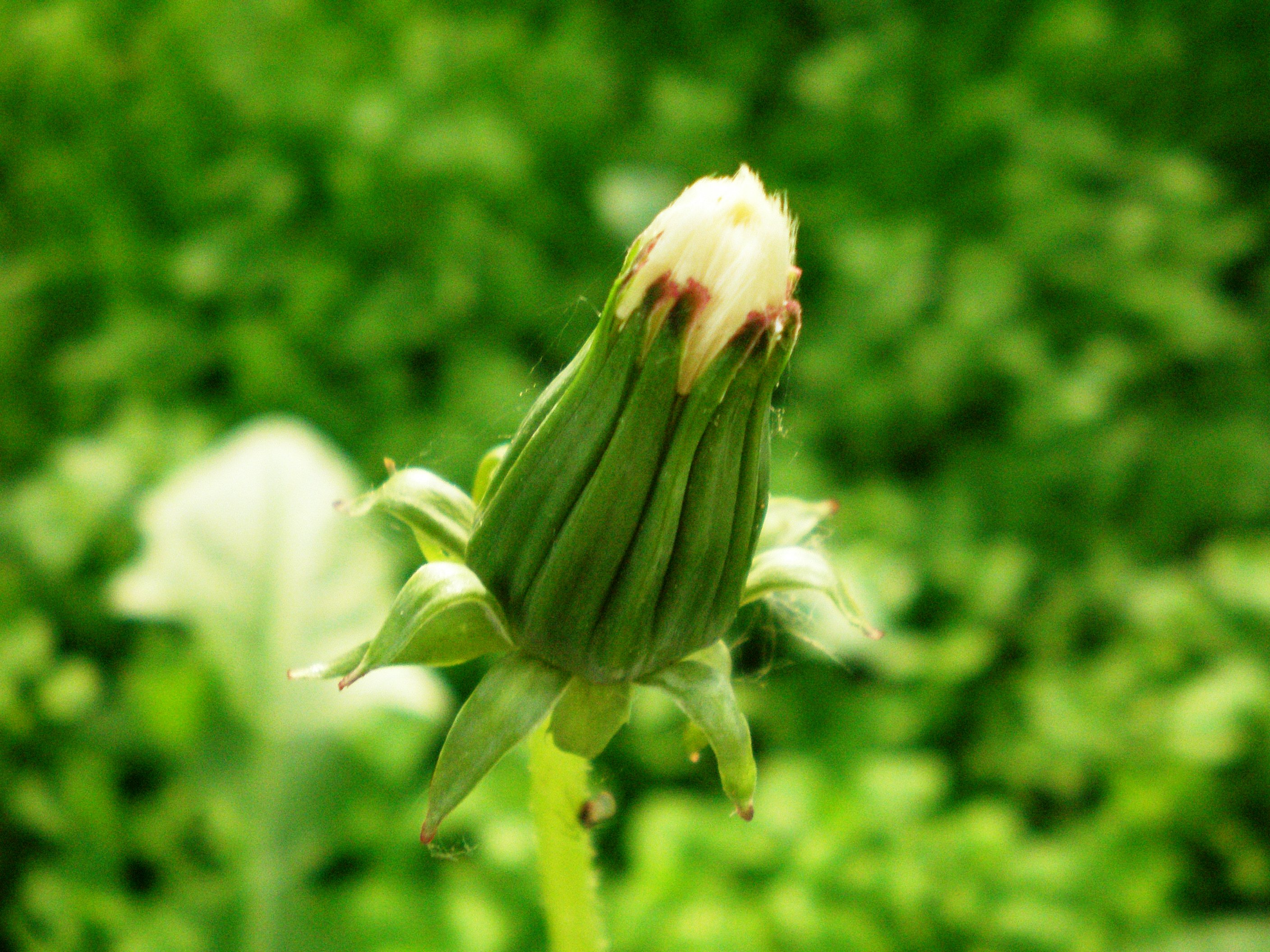 Paprastoji kiaulpienė